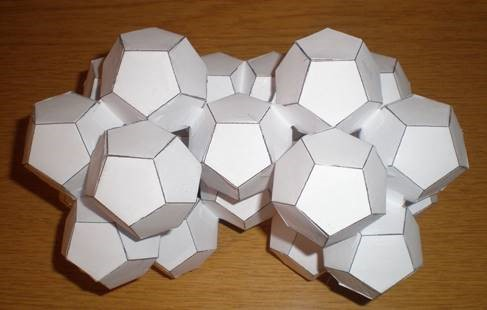 Az ikozi-ikozaéder két szomszédos dodekaéder csillaga